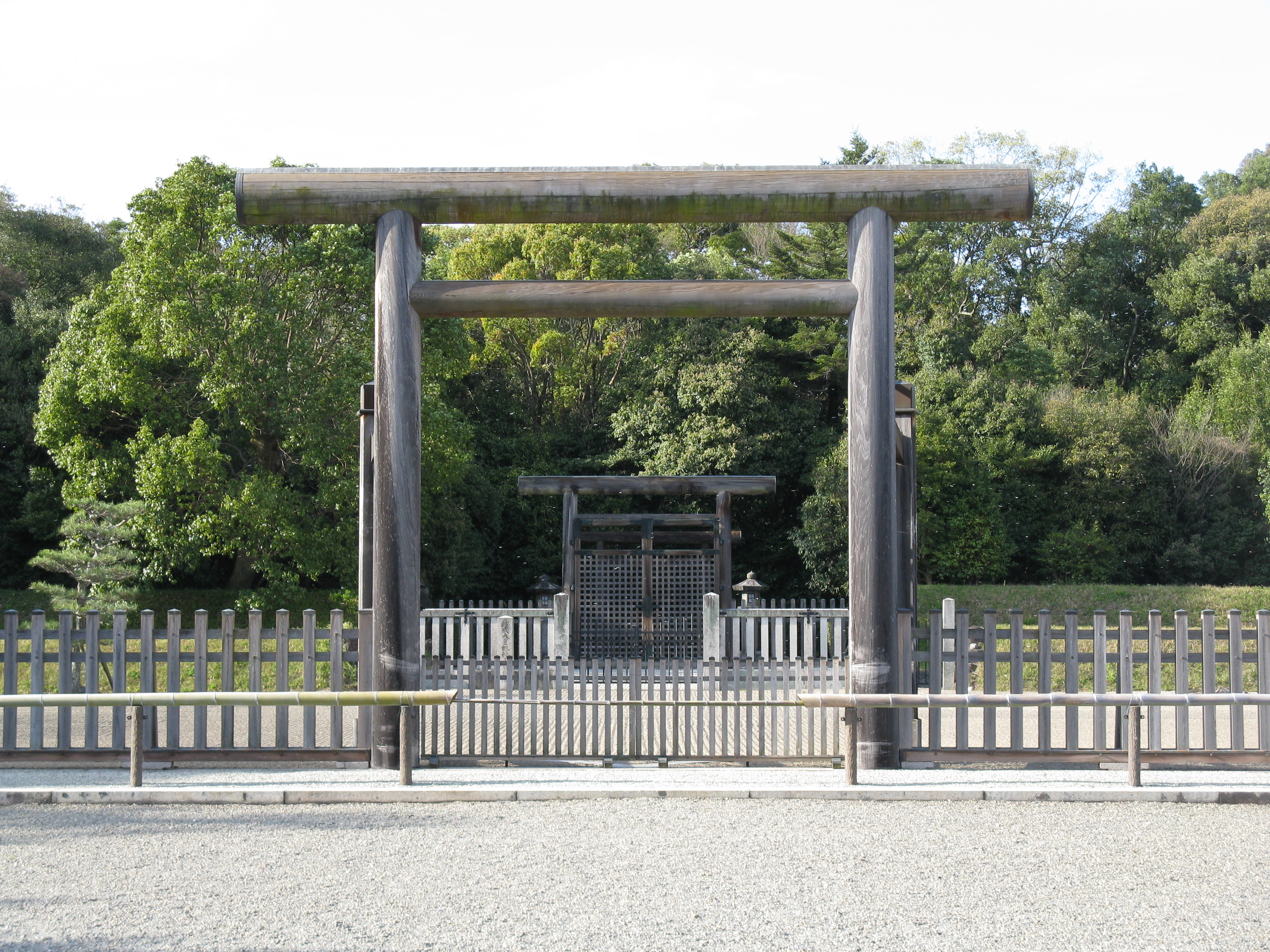 神武天皇畝傍山東北陵（神武天皇陵）